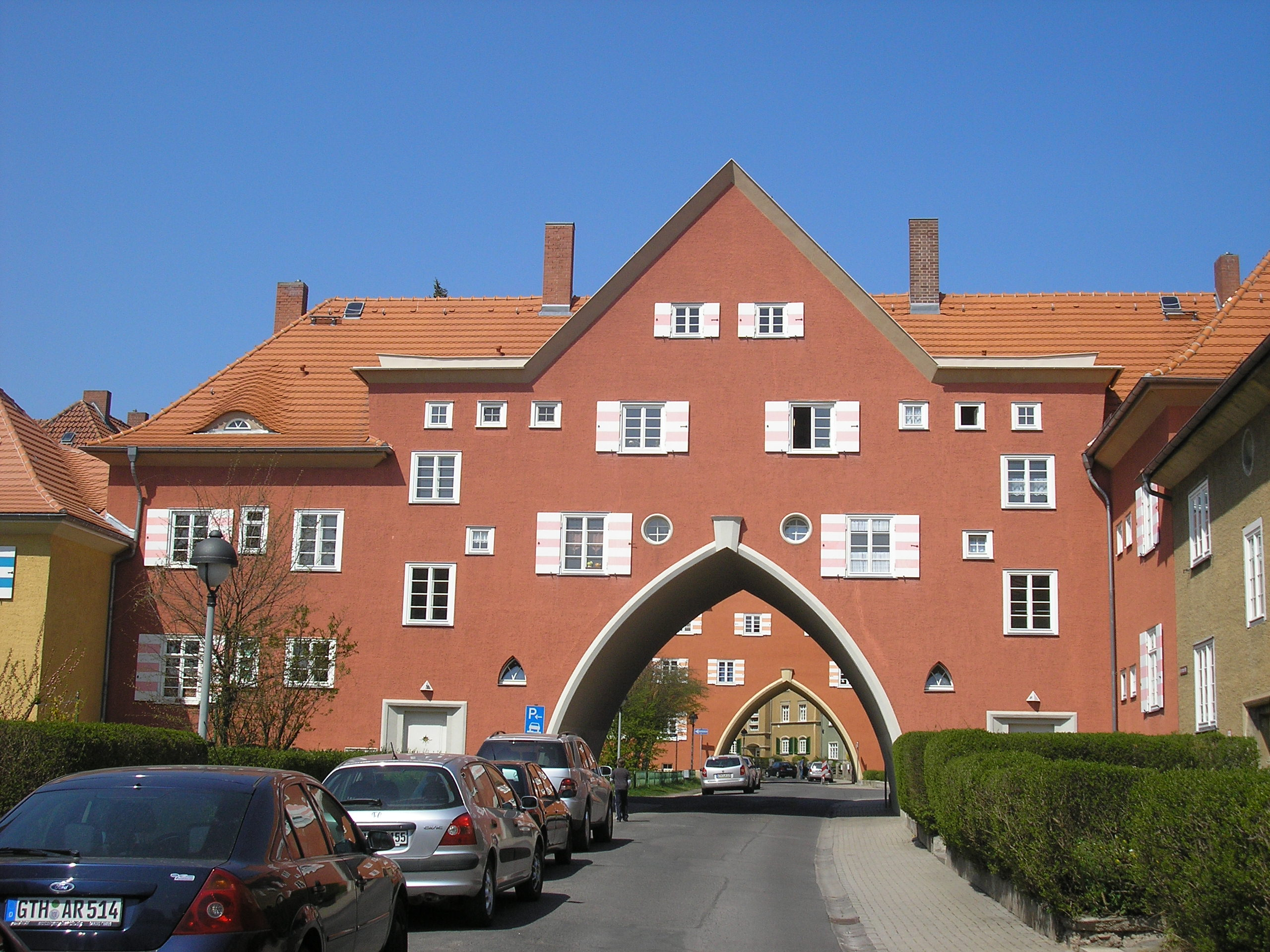 Die Gartenstadt "Am Schmalen Rain" in Gotha (Thüringen).